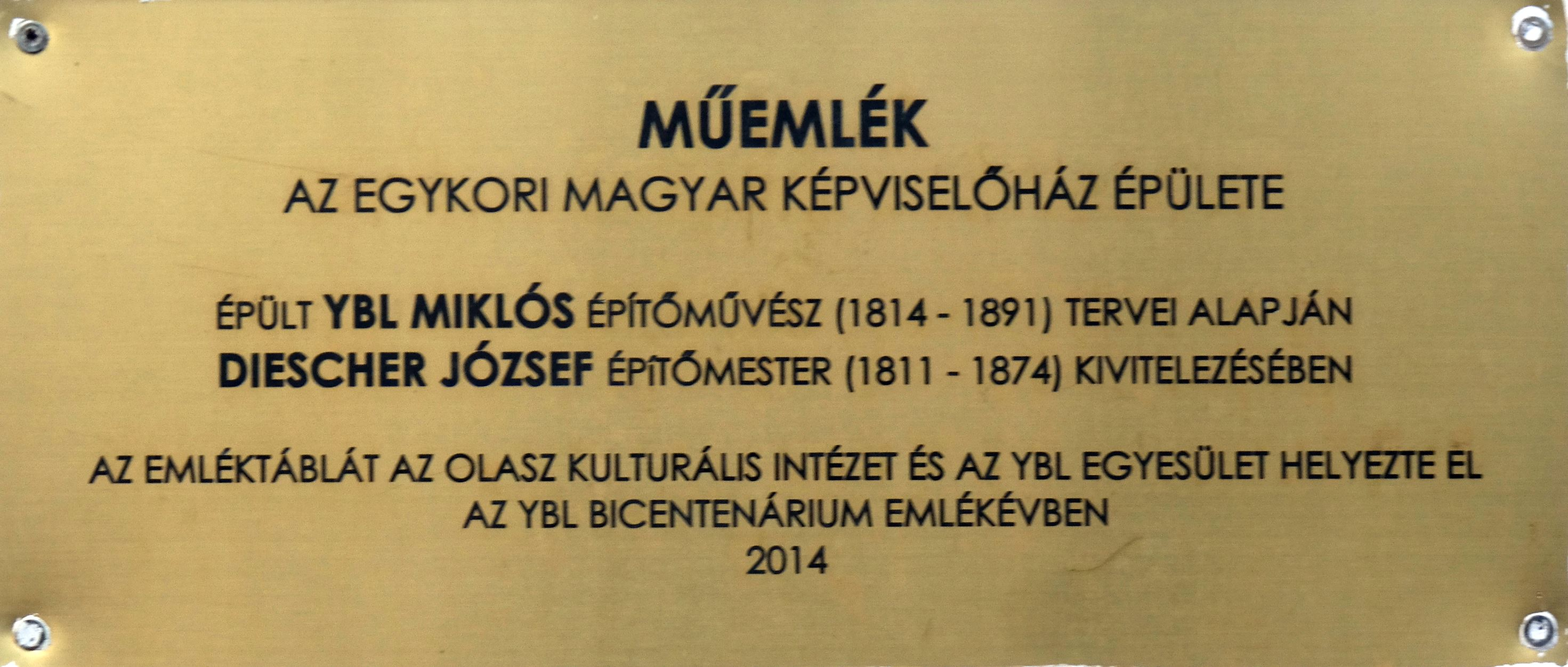 Ybl Miklós és Diescher József emléktáblája az egykori Magyar Képviselőház falán (Budapest VIII., Bródy Sándor utca 8.)